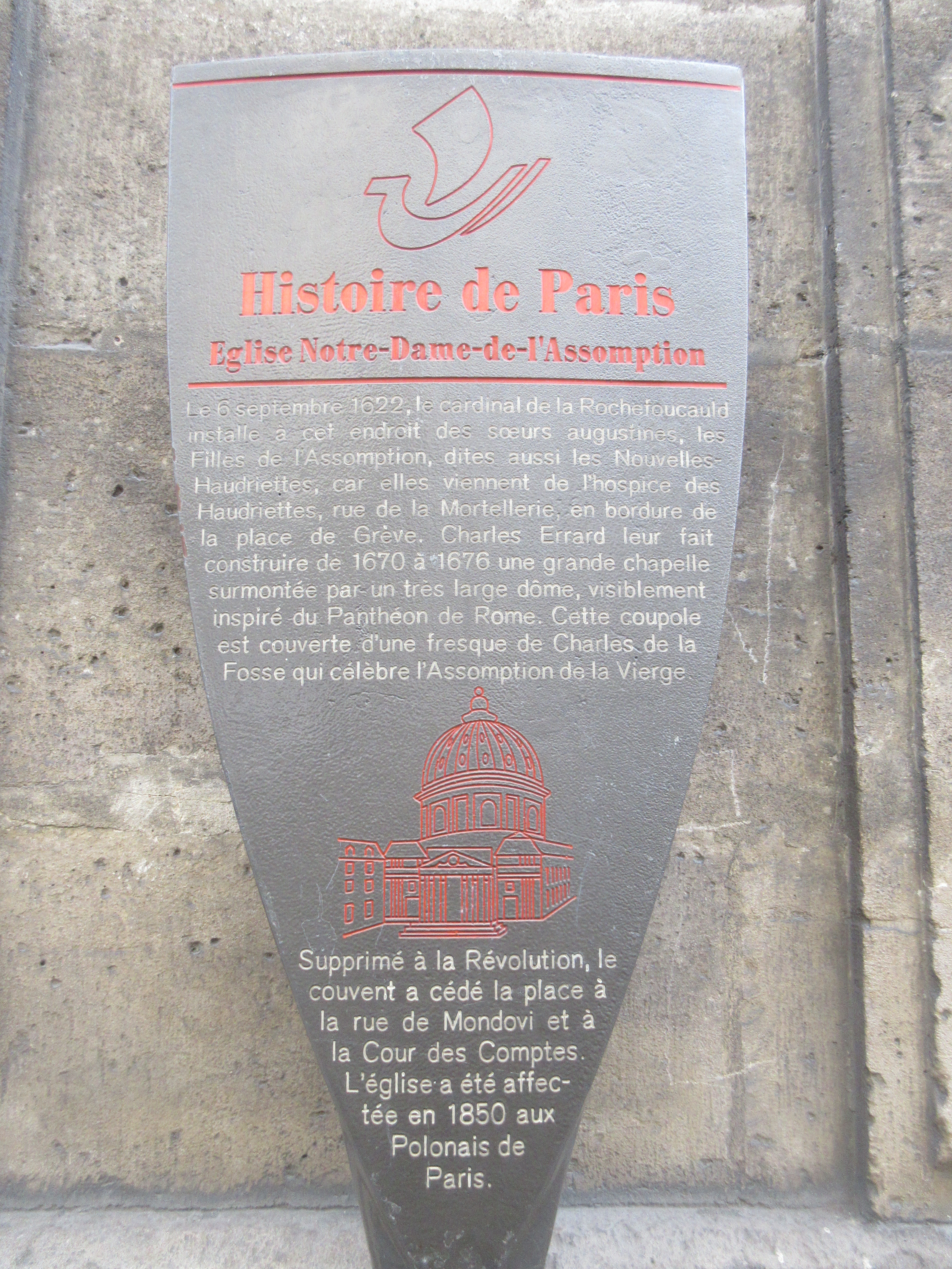 Panneau Histoire de Paris